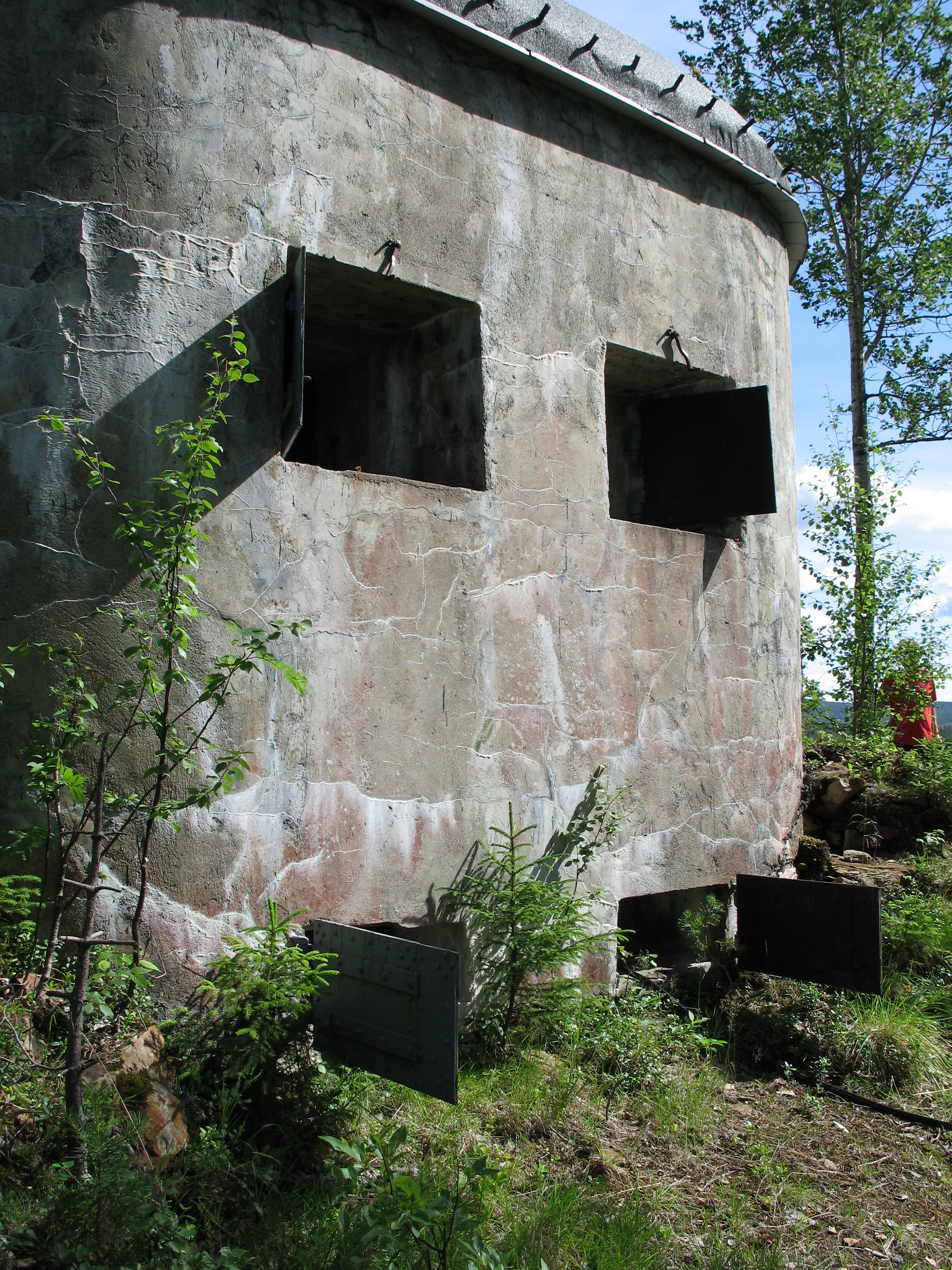 "Blokkhuset" ovenfor Vaterholmen leir.